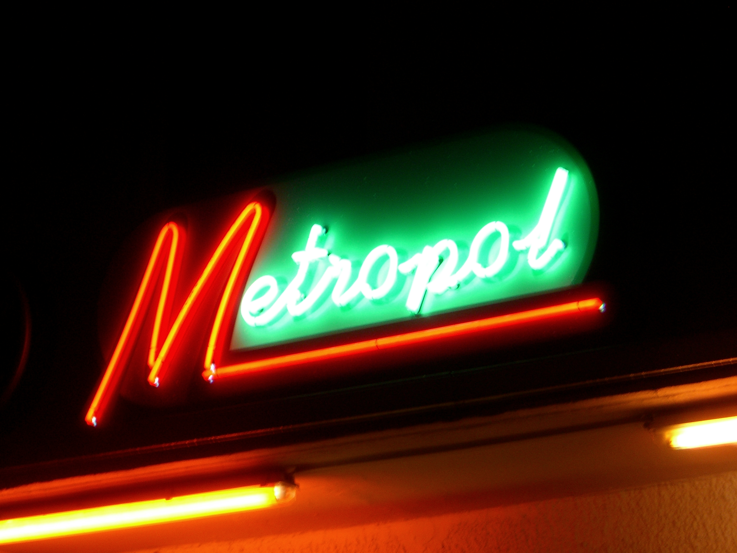 München - Metropol-Theater (Neonschild)